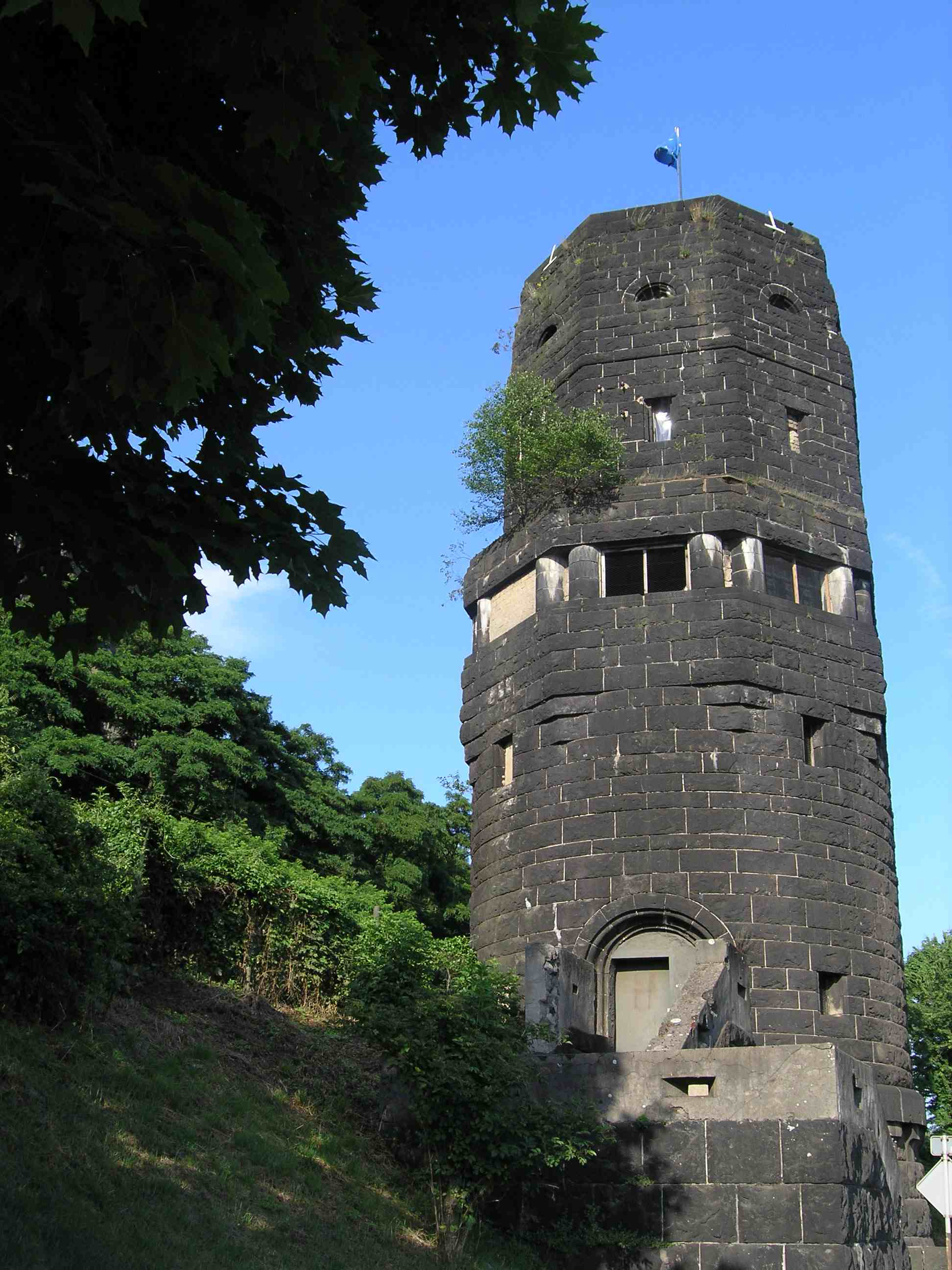 rechtsrheinischer Pfeiler der Brücke von Remagen